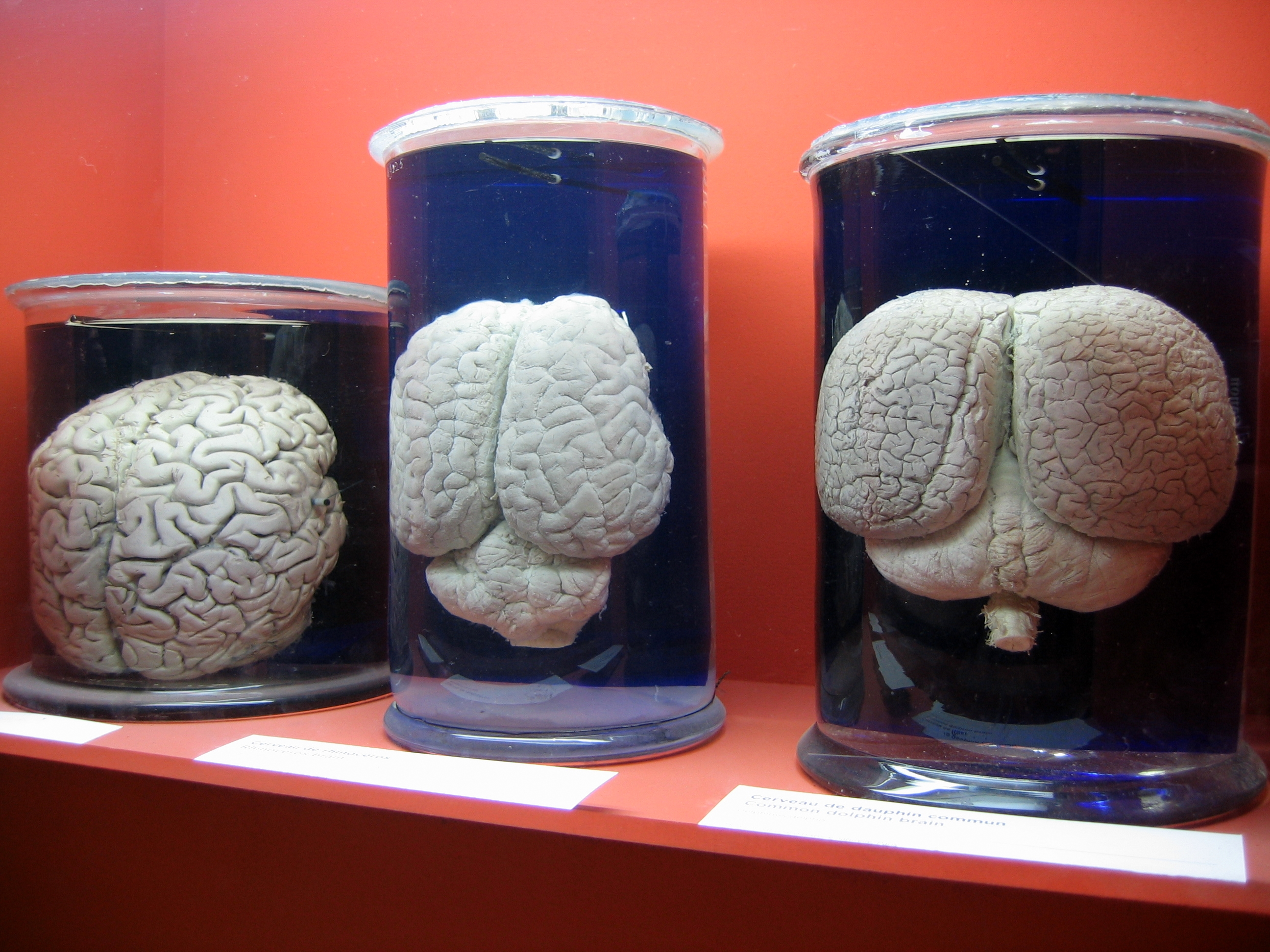 Trois cerveaux, de gauche à droite, un cerveau d'homme, un de rhinocéros?? et un de dauphin